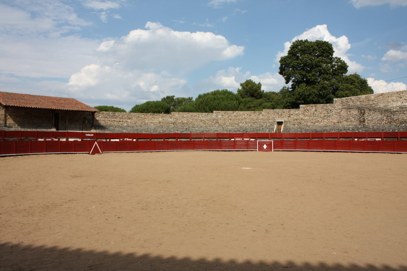 Plaza de toros de Béjar (Interior)